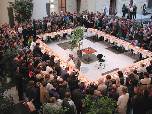 Une séance de parties simultanées de Garry Kasparov.